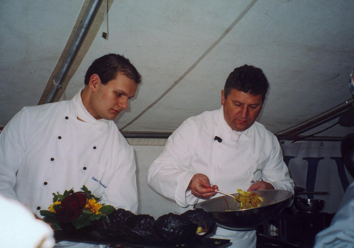 Heinz Wehmann auf dem Ökomarkt in Aktion. Aufgenommen von Julian Wehmann.